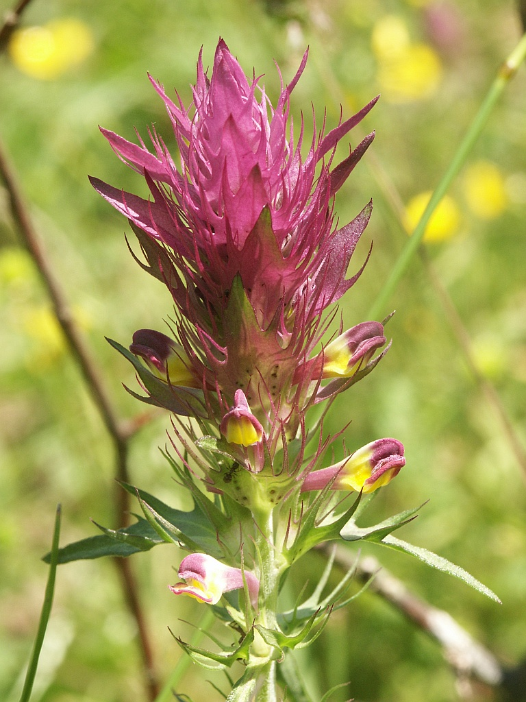 Melampyrum arvense, Bauland, Germany